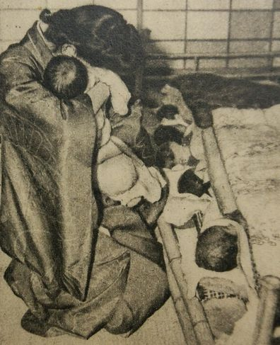 寿産院事件被害者ら